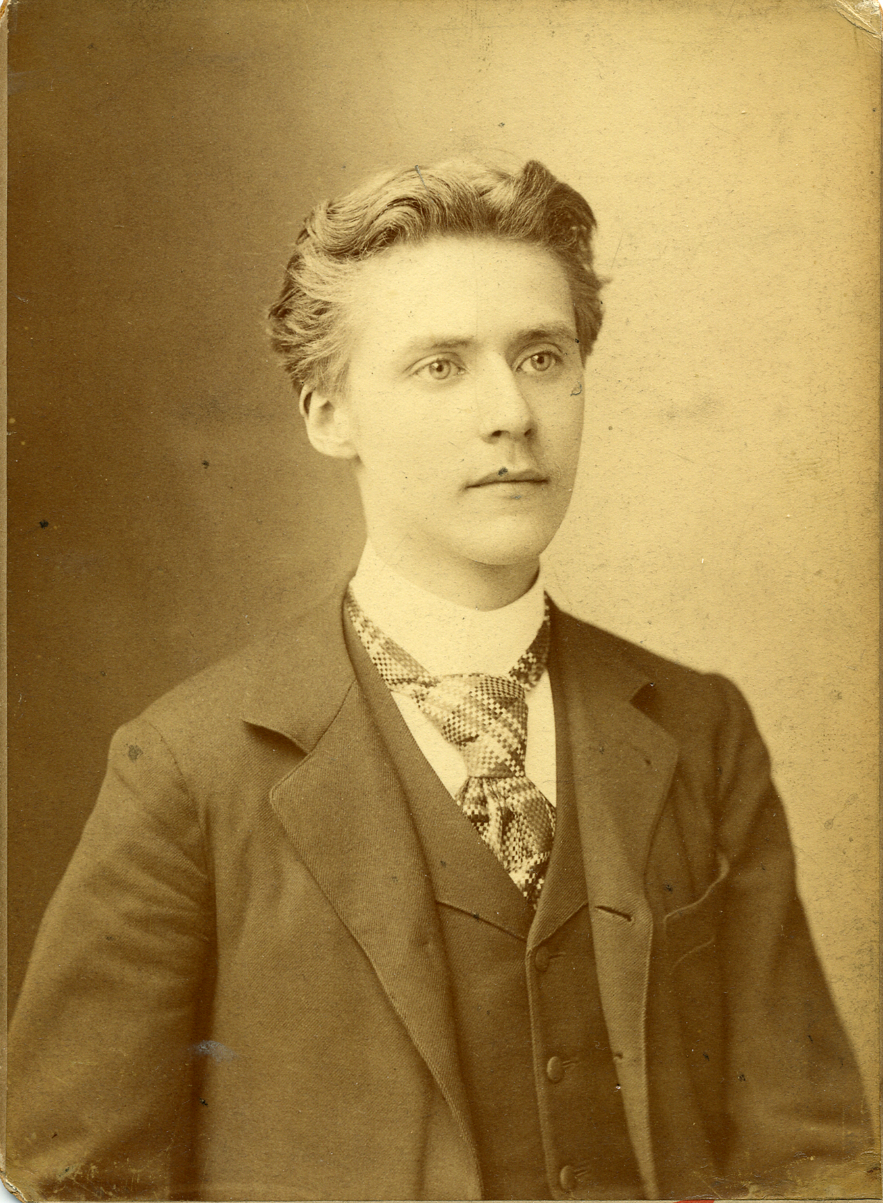 Max d'Ollone photographié par Nadar